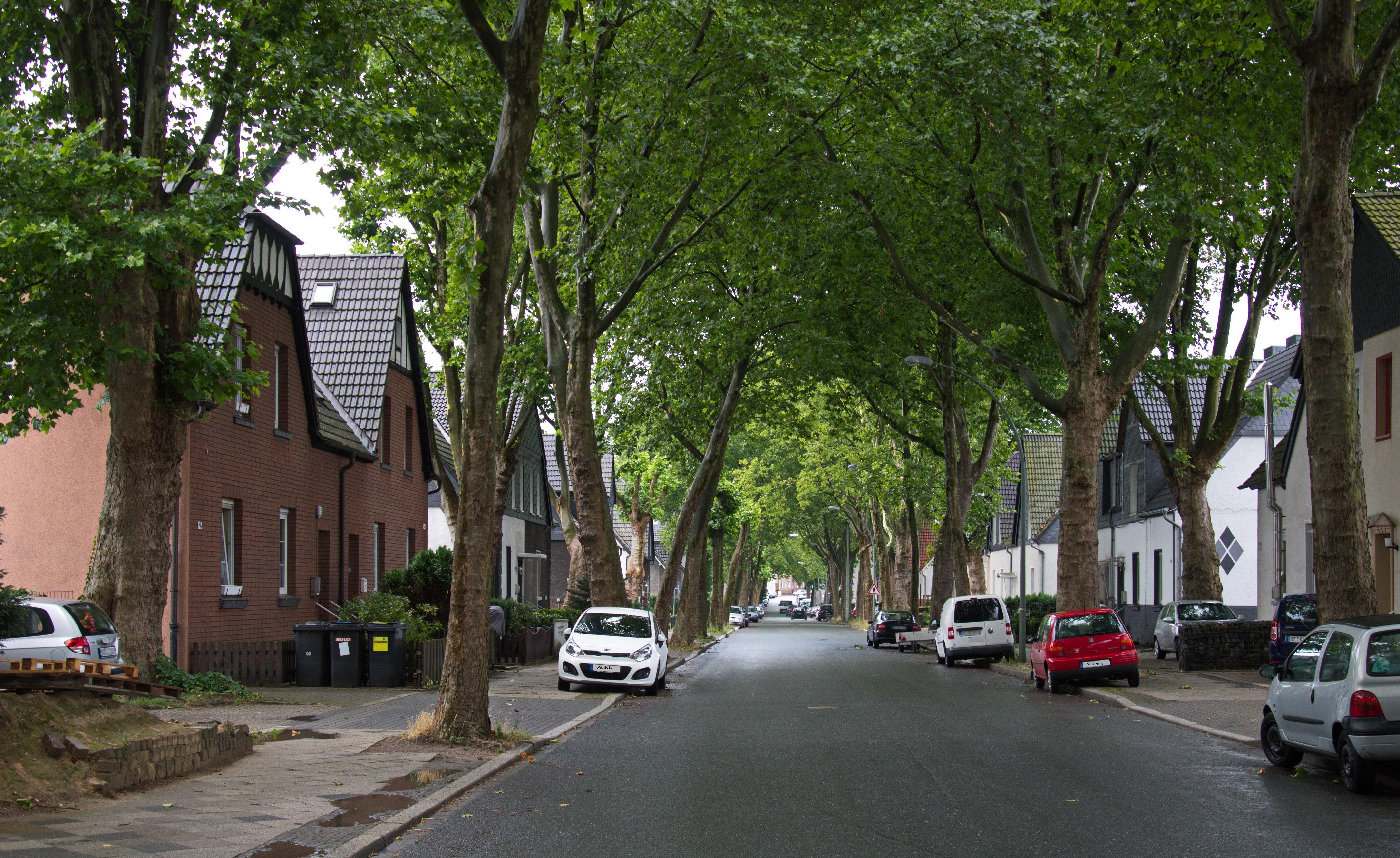 Weststraße